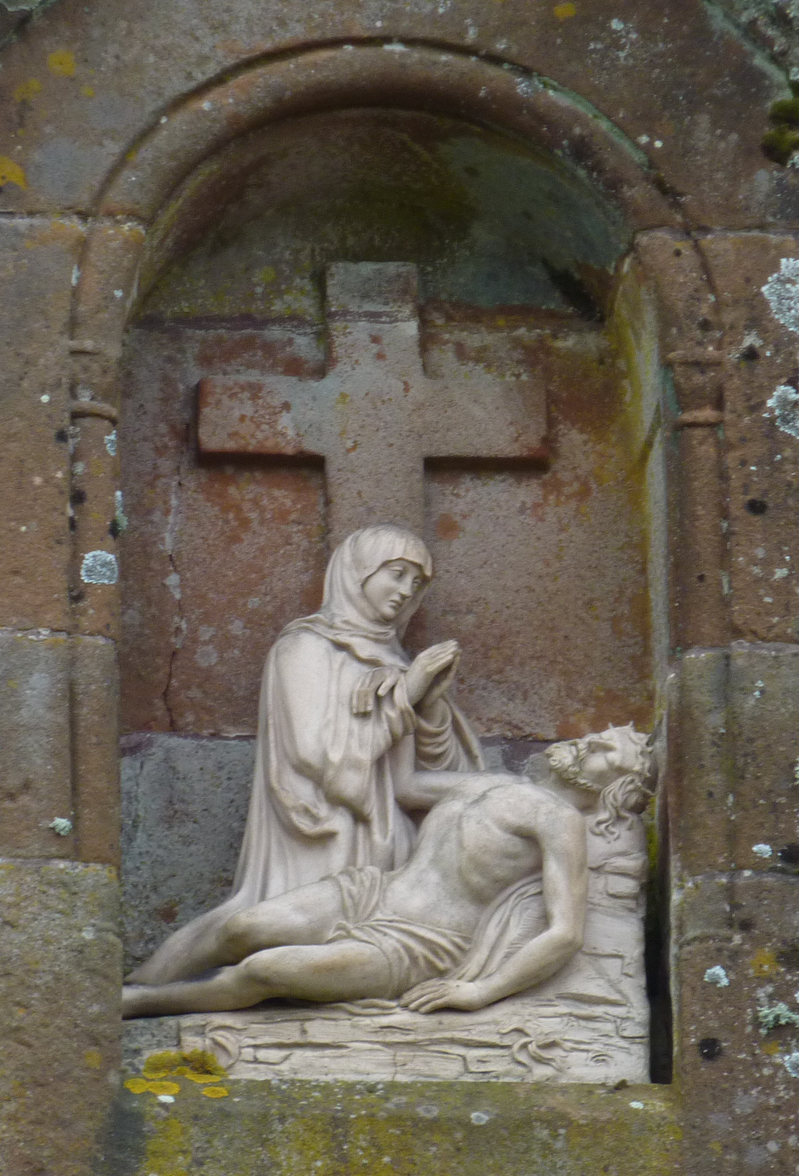 Pietà über dem Friedhofstor bei der Kirche St. Johann Baptist in Kastel